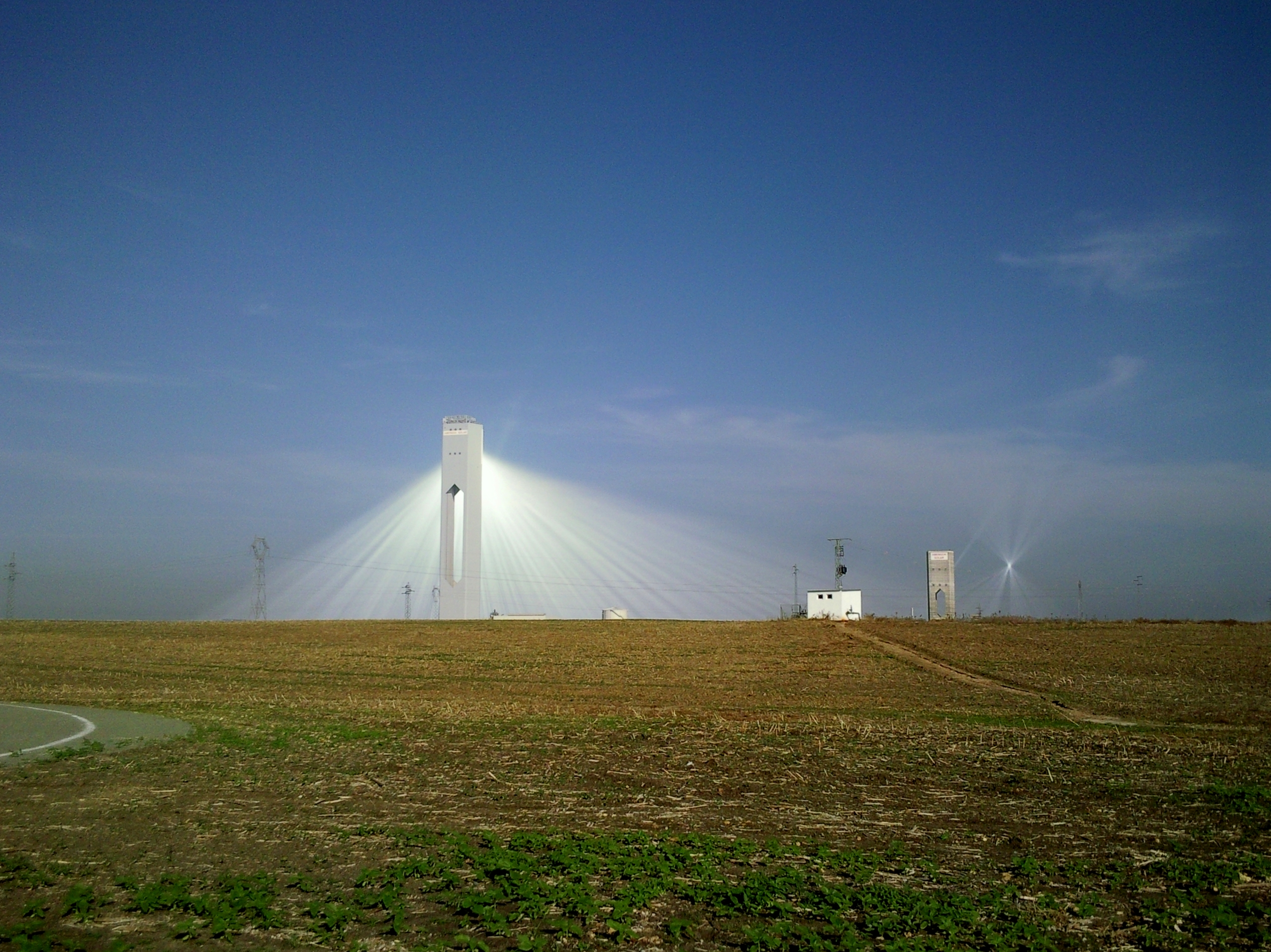 Tours solaires PS 20 et Eureka 5 à Sanlúcar la Mayor dans les environs de Séville (Espagne).